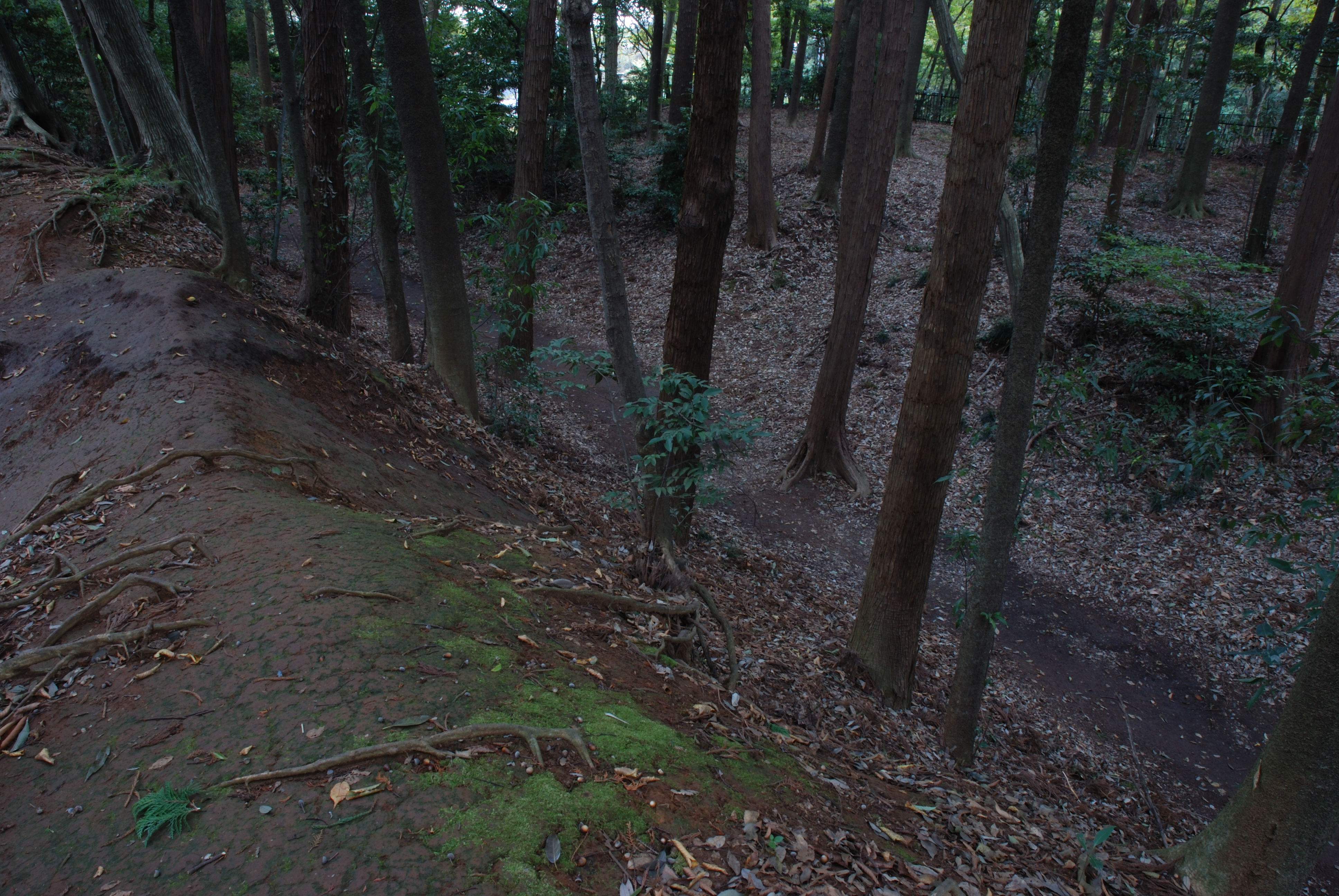 Masuo Castle karabori